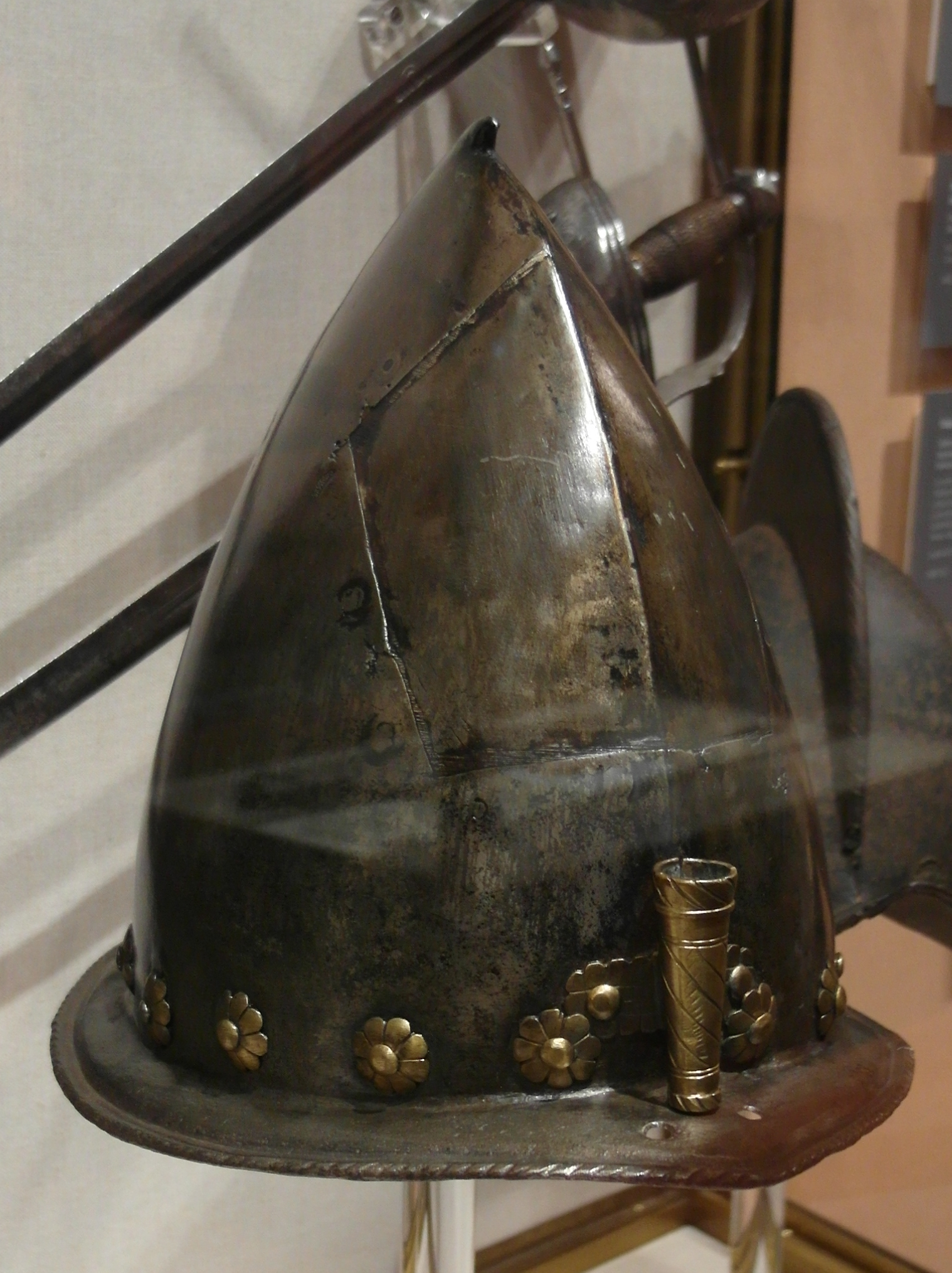 Capacete español hacia1550. Museo Naval de Madrid.